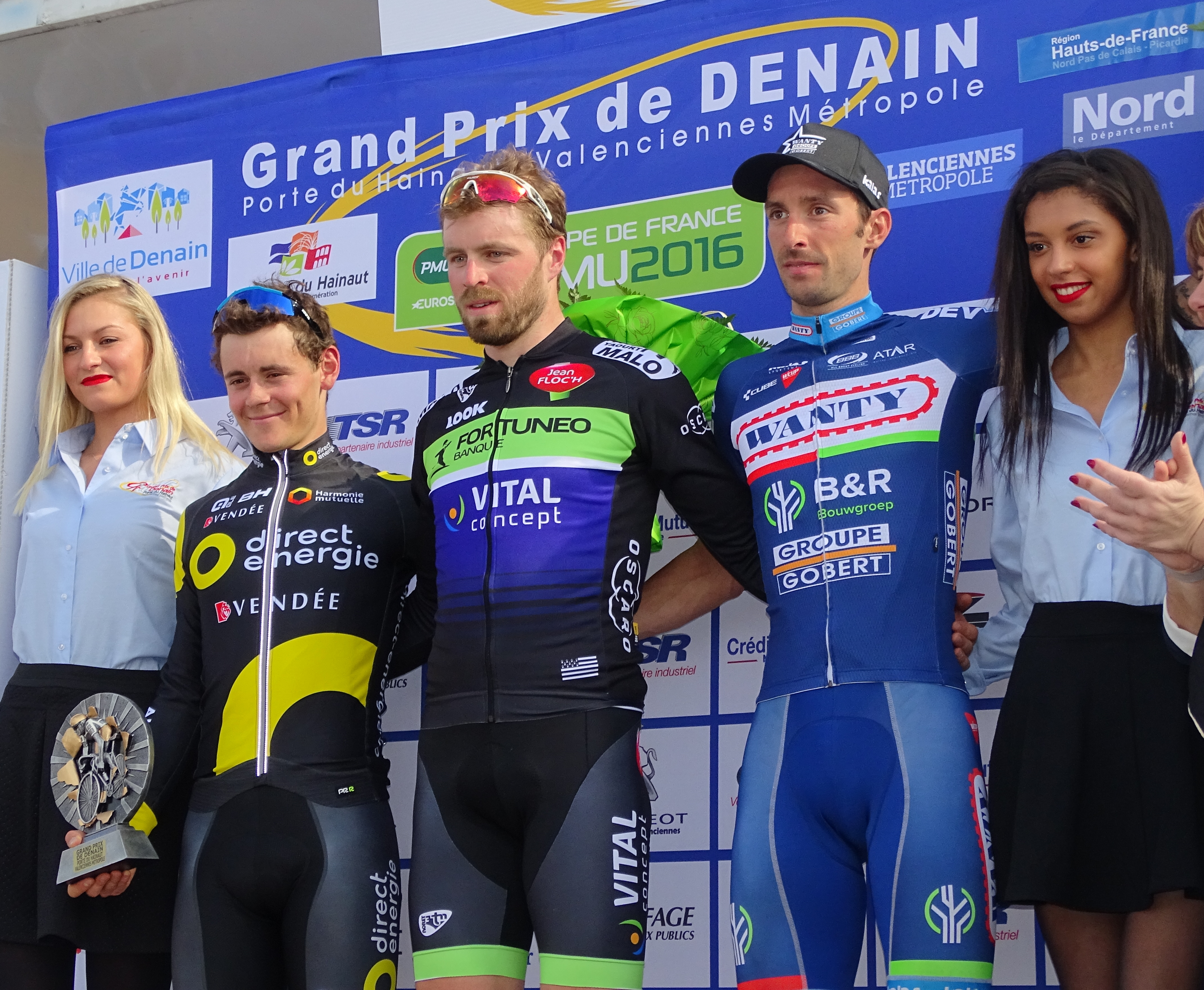 Reportage réalisé le jeudi 14 avril à l'occasion du départ et de l'arrivée du Grand Prix de Denain 2016 à Denain, Nord, Nord-Pas-de-Calais-Picardie, France.